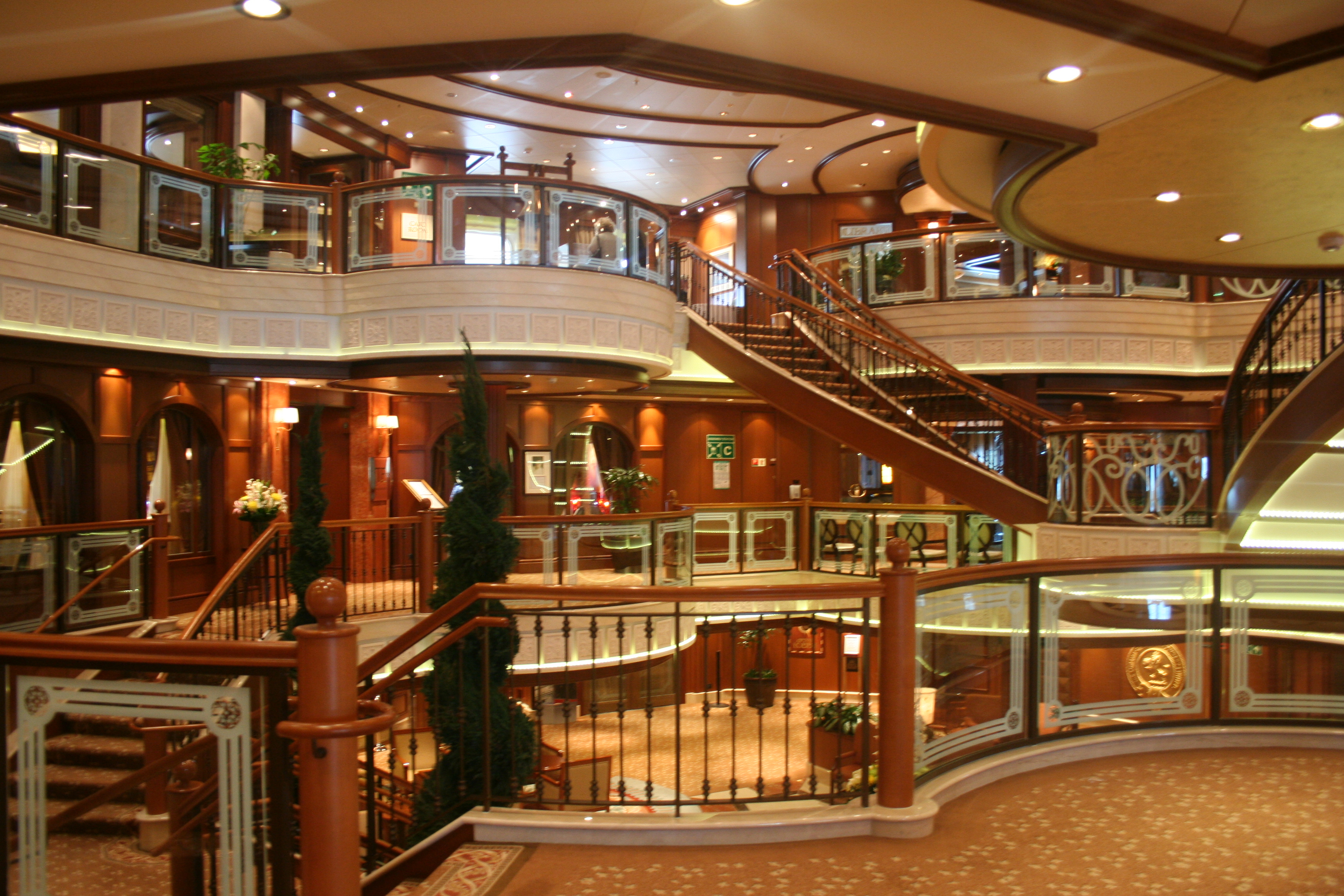 MS Queen Victoria Entrance